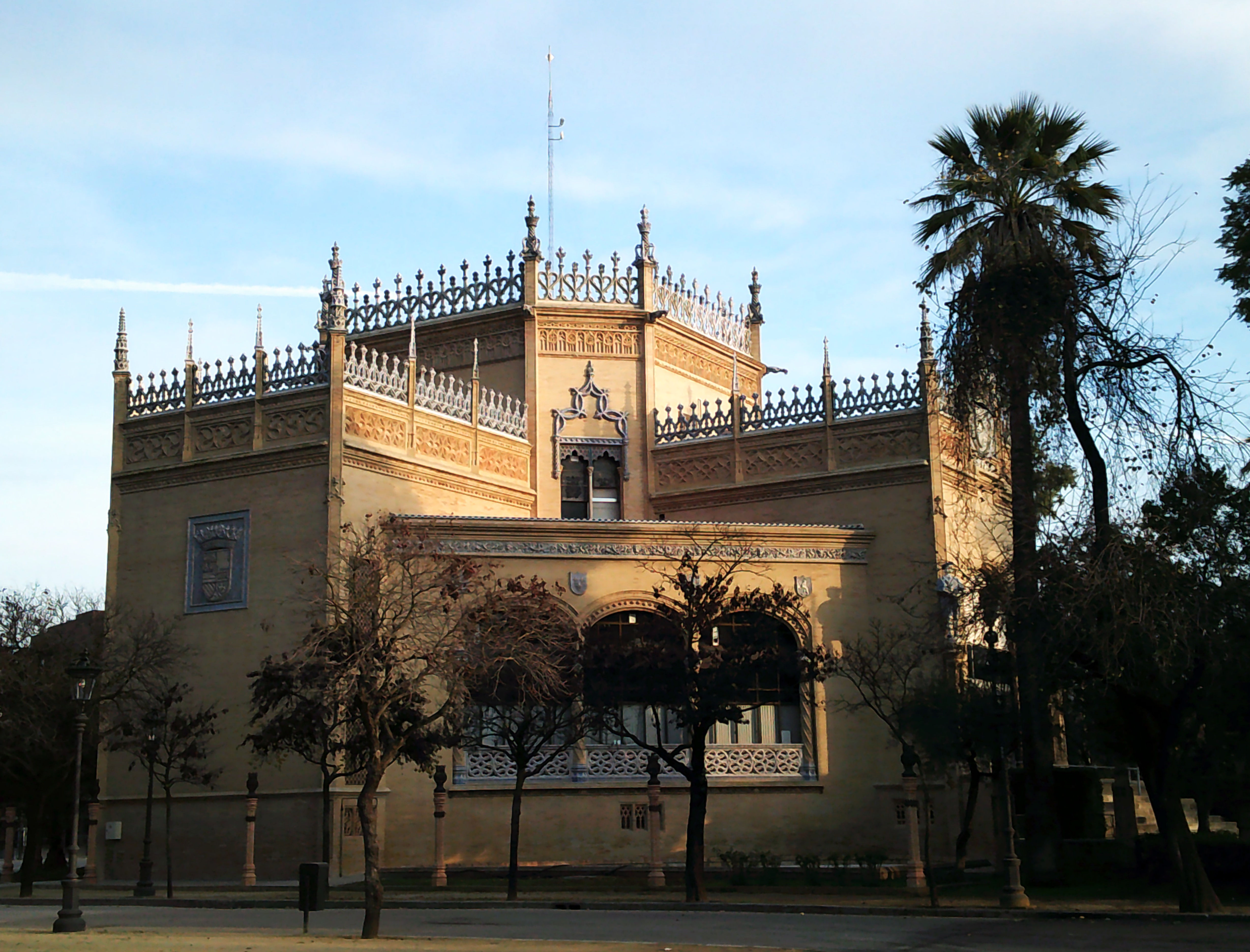 Pabellón Real de la Exposición Iberoamericana de 1929. Sevilla, Andalucía, España.